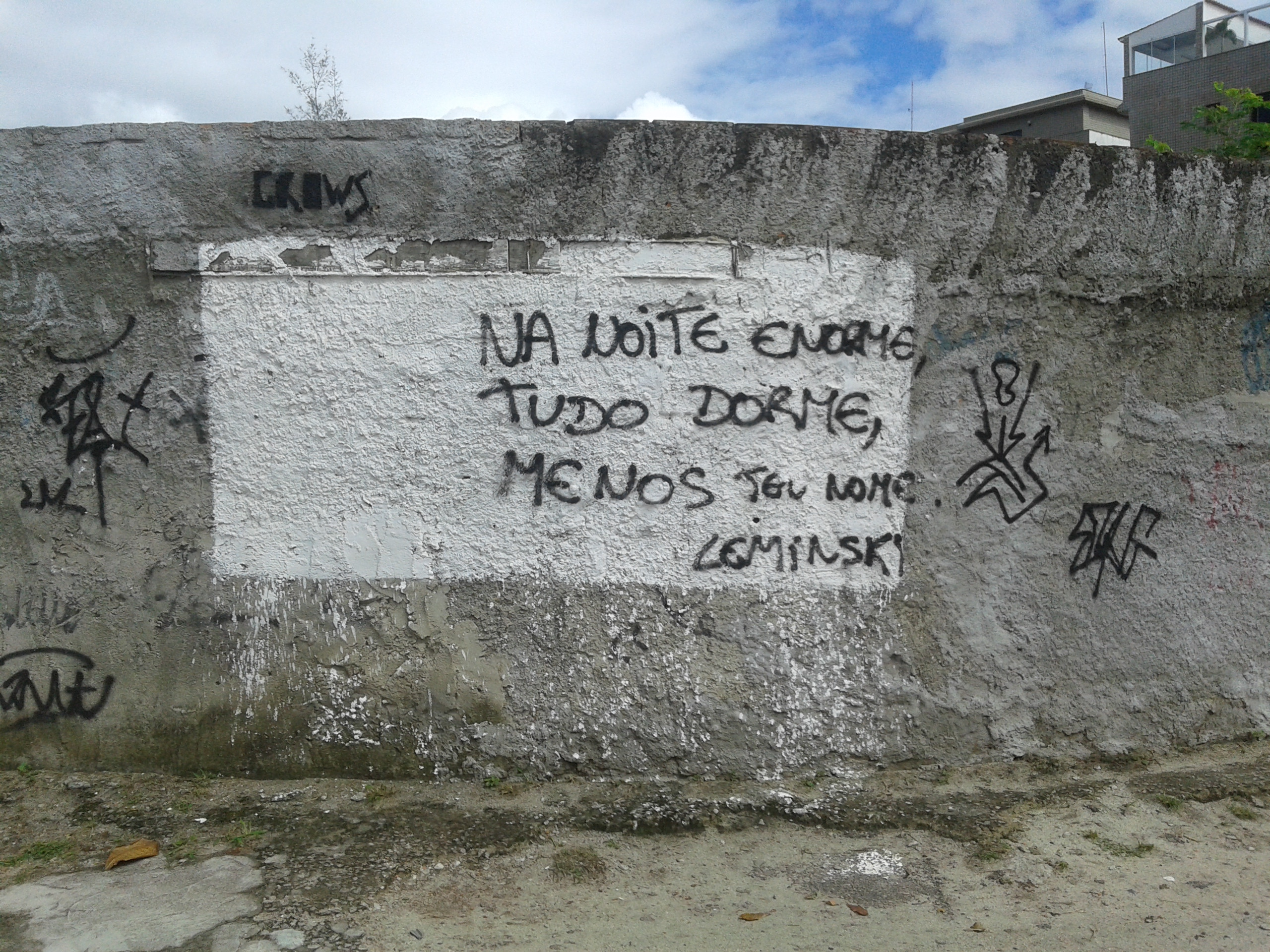 Pichação contendo o poema "Na noite enorme", de Paulo Leminski. Encontrado na esquina das ruas Genaro de Carvalho e Senador Ruy Carneiro, no bairro Recreio dos Bandeirantes, Rio de Janeiro. Transcrição: Na noite enorme Tudo dorme, Menos teu nome Leminski